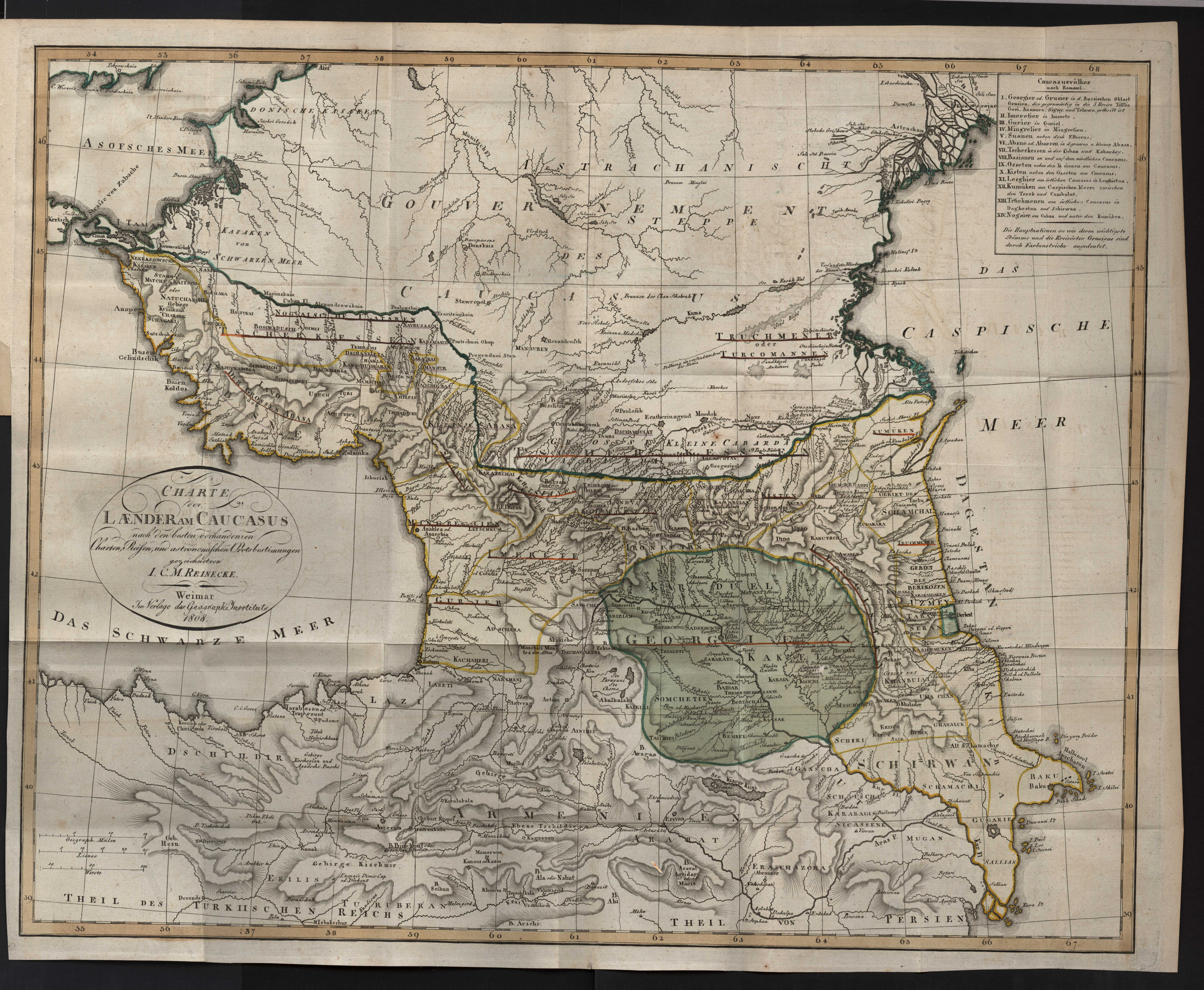 Die Völker des Caucasus nach den Berichten der Reisebeschreiber ; nebst einem Anhang zur Geschichte des Caucasus vom Herrn Prof. C. Rommel in Marburg ; mit 1 Charte und 4 colorierten Kupfertafeln 1 - 4 / [Geissler]